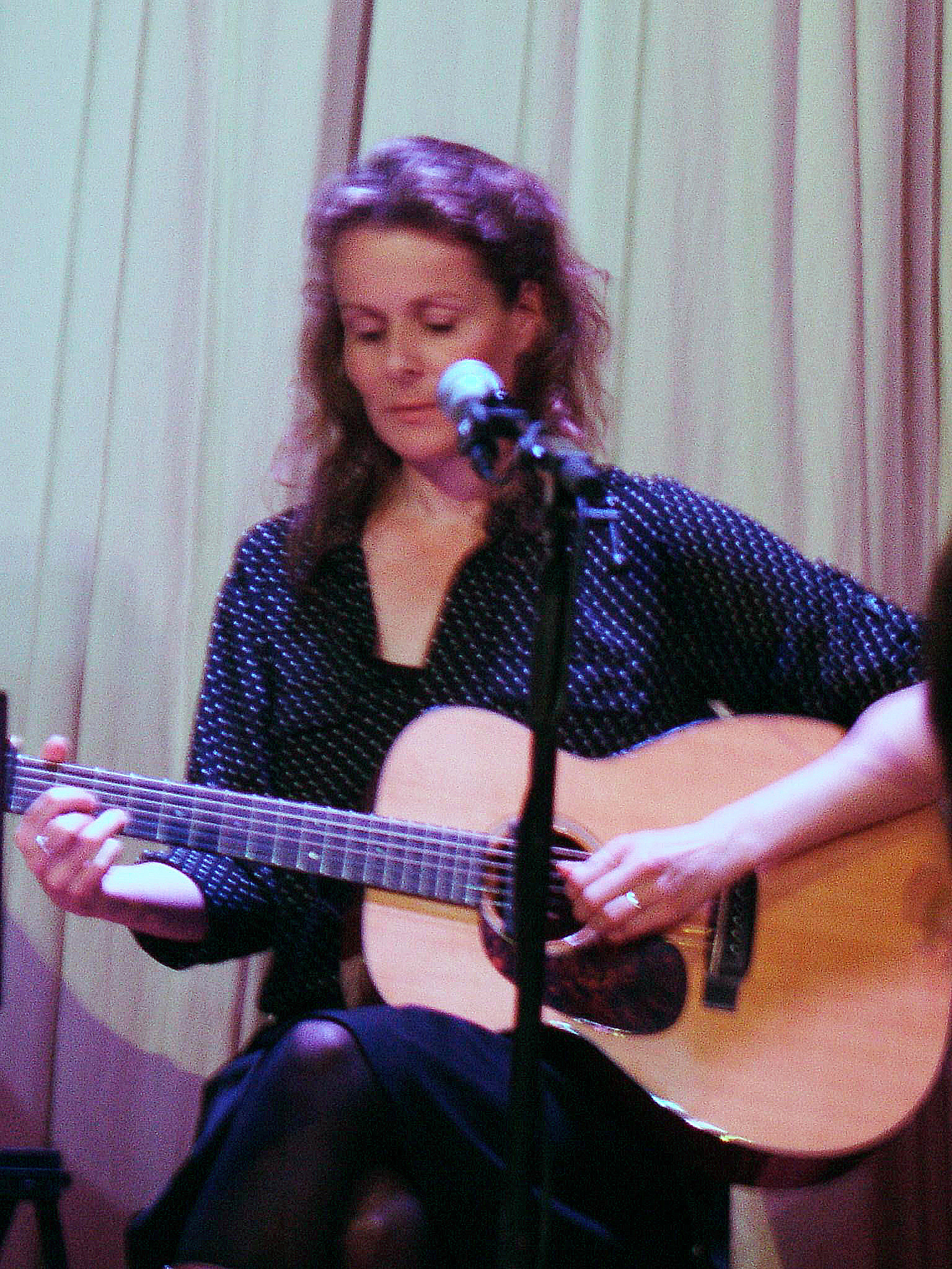 Marjolein van der Klauw tijdens een optreden van het Avalanche Quartet in de Buiksloterkerk in Amsterdam-Noord